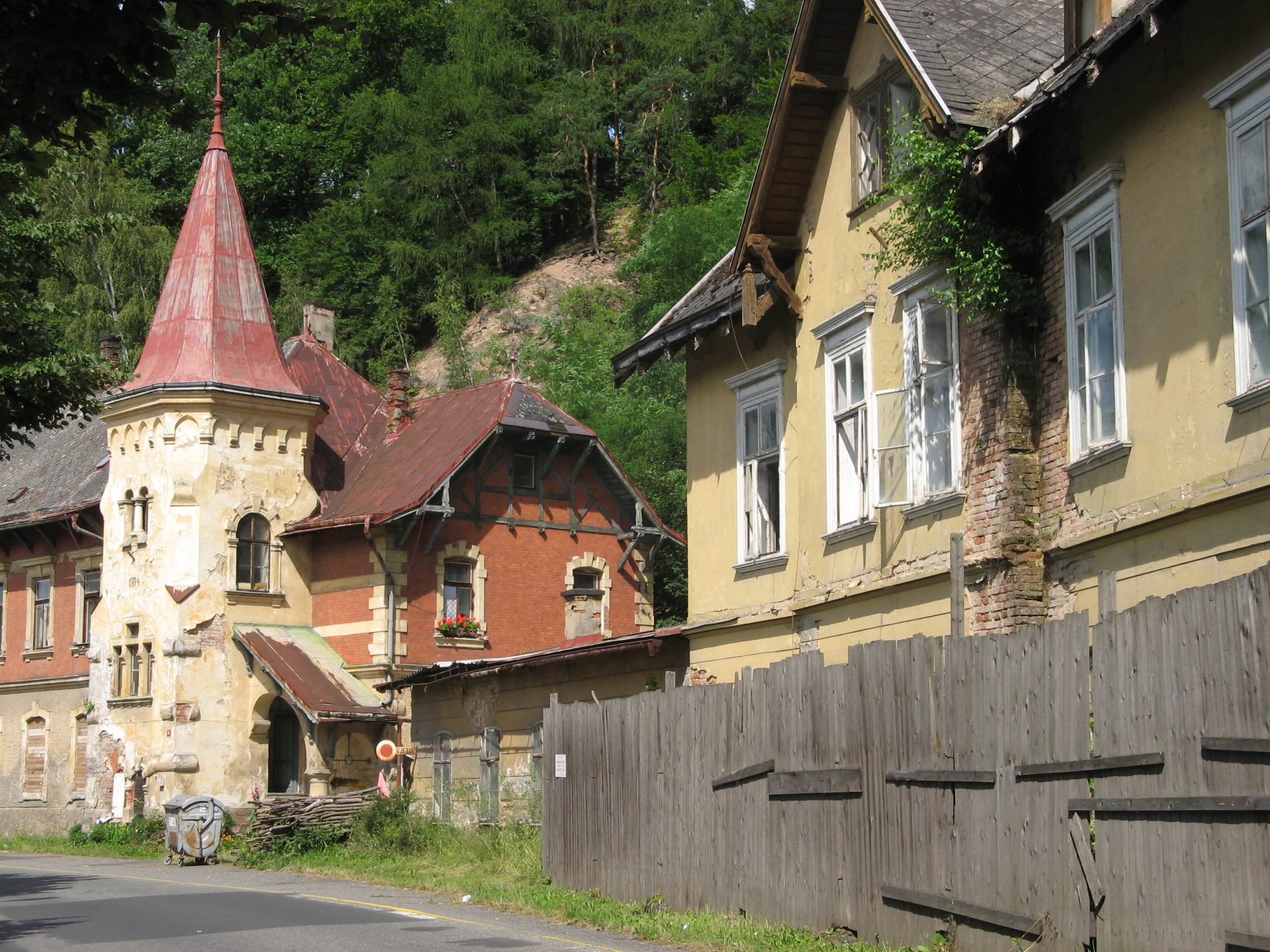 Chátrající budovy bývalého lázeňského střediska Kyselka v okrese Karlovy Vary